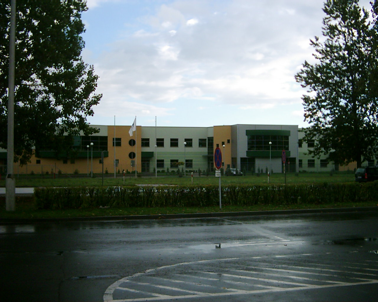 Mondi Bags Świecie- producent worków papierowych